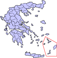 Додекадес на карте Греции